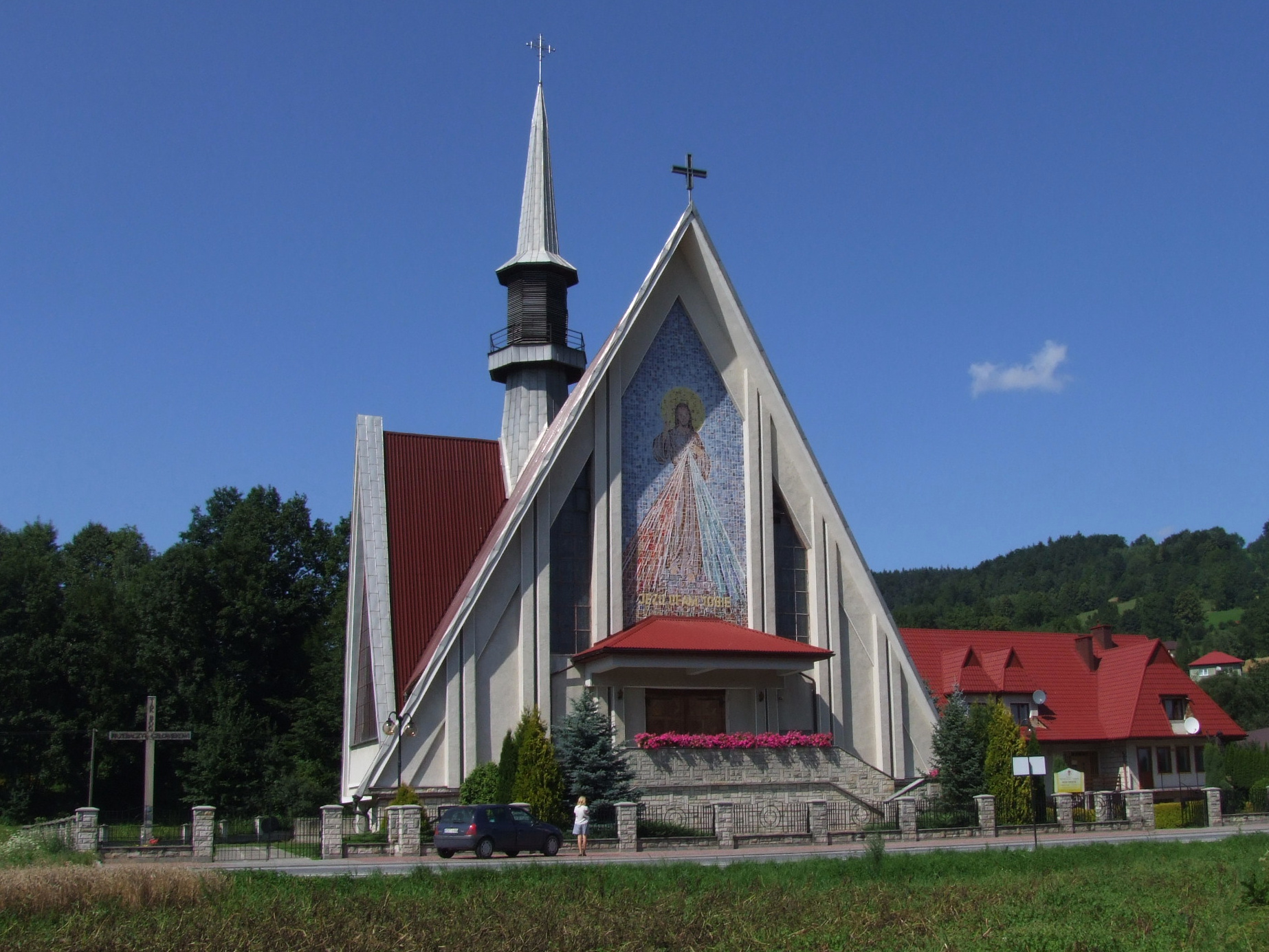 Podłopień. Kościół.